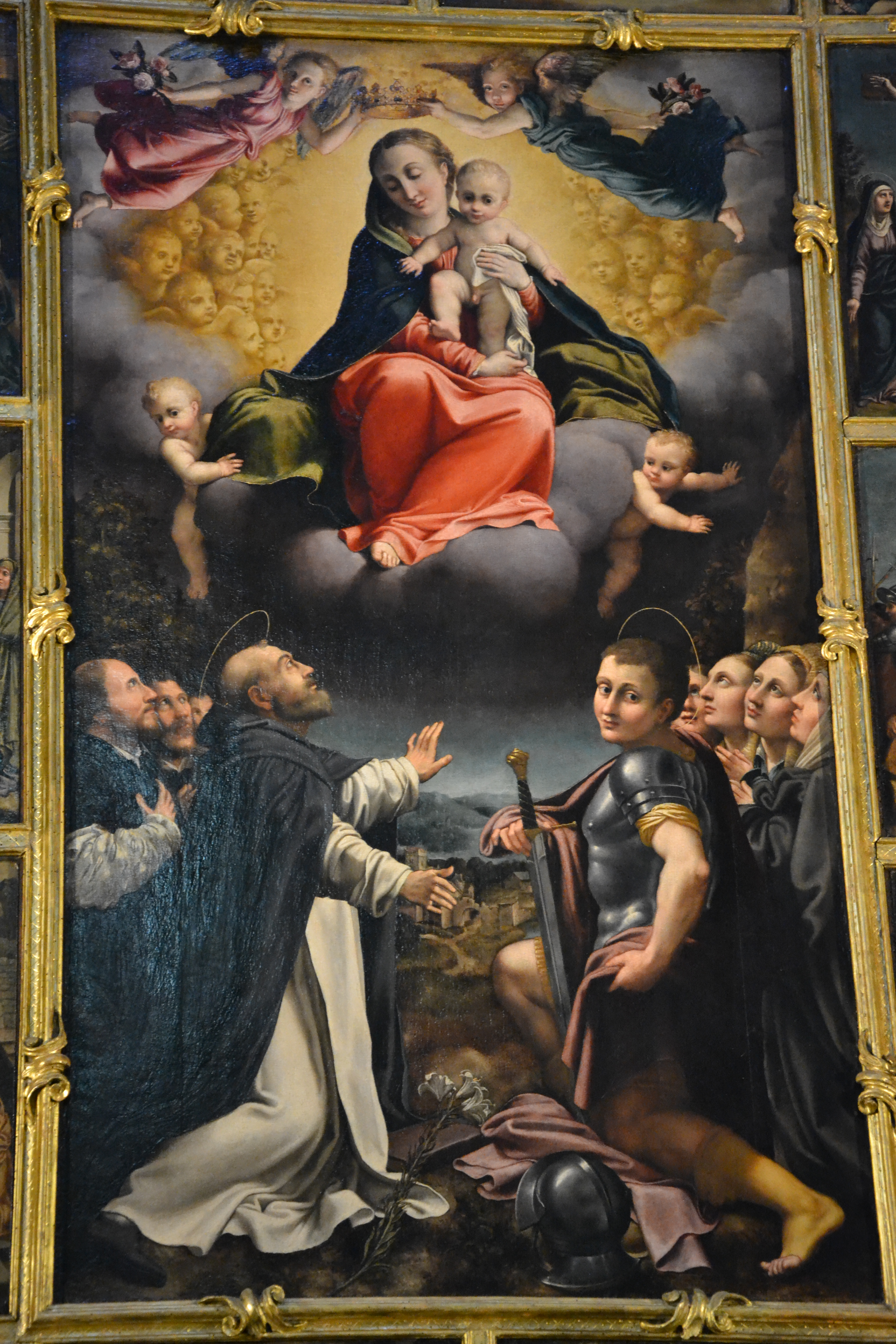 Madonna del Rosario (data 1531) di Bernardino Gatti detto il Sojaro, artista rinascimentale pavese che operò anche tra Piacenza e Cremona. 14 immagini di “Misteri” mettono in rilievo la figura centrale, “Madonna e Santi”. Interno del Duomo (Pavia)